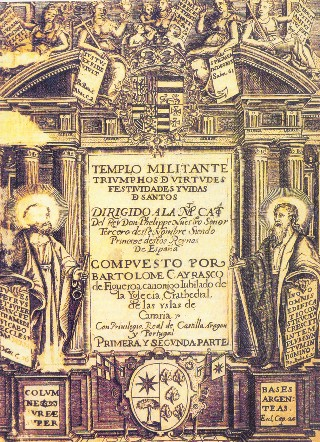 Portada de la obra de Cairasco de Figueroa titulada Templo Militante, primera y segunda parte.